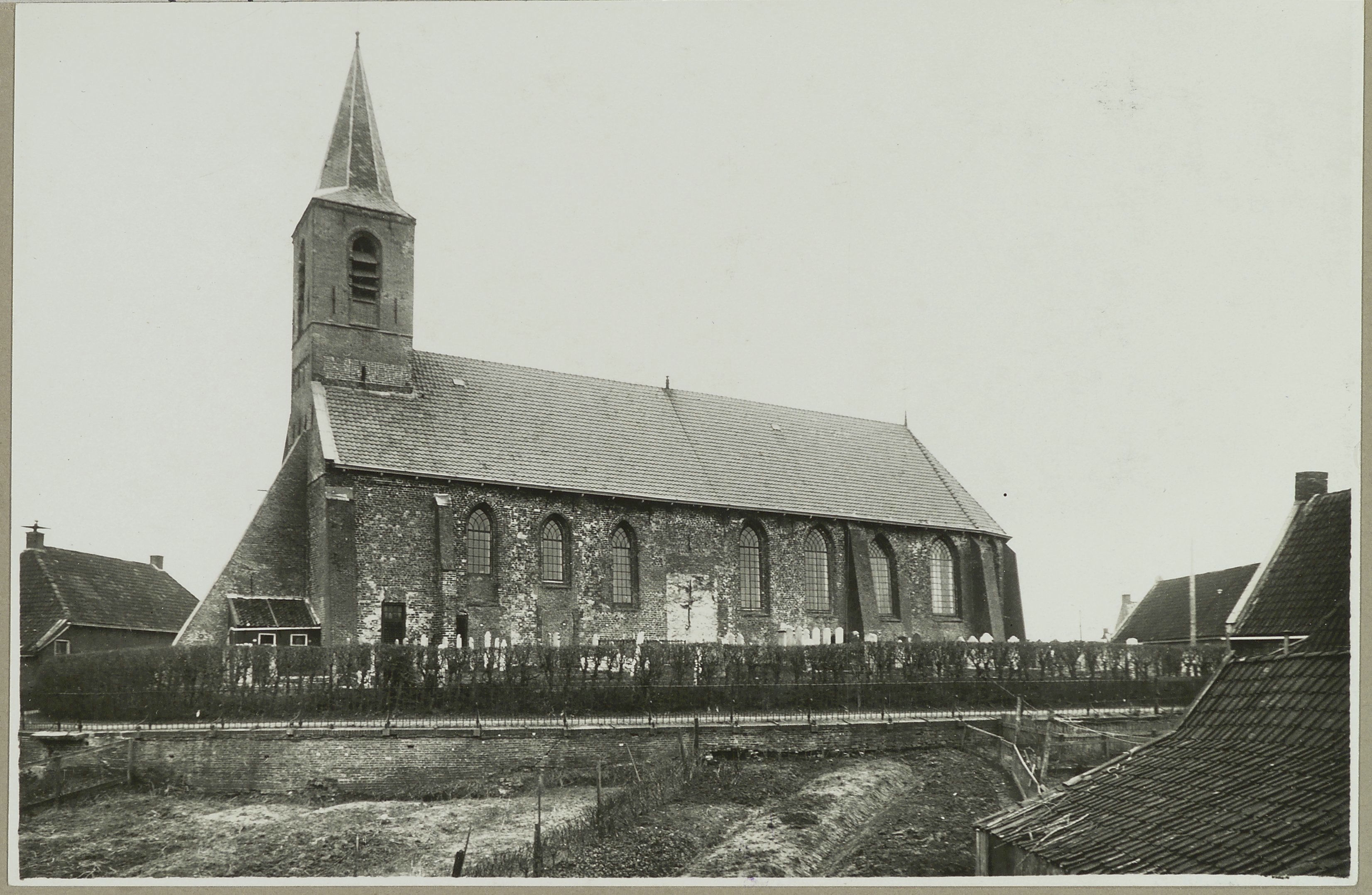 Nederlands Hervormde Kerk: Zuidgevel (opmerking: Fotograaf te Leeuwarden)